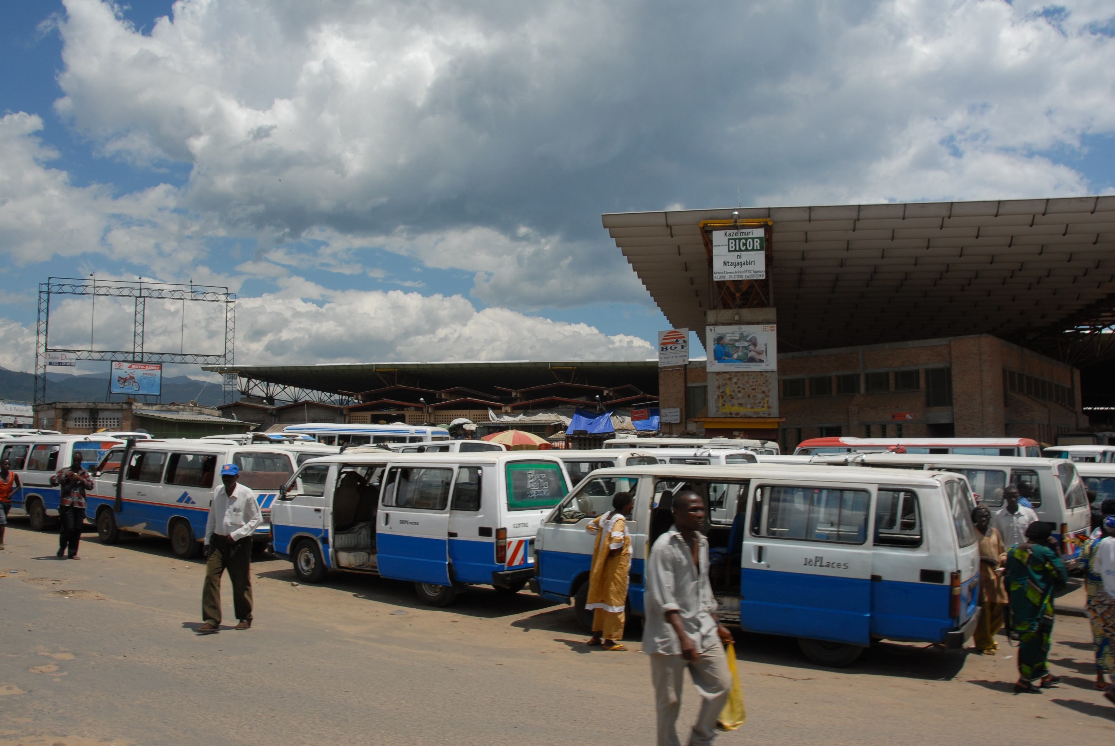 Bujumbura